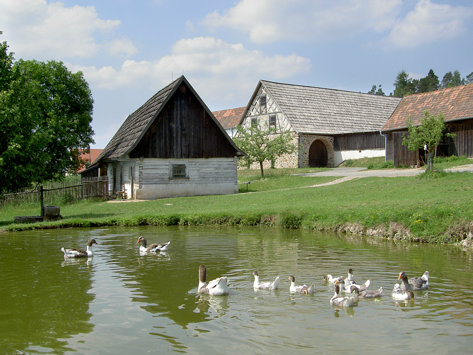 Ein Teil des Oberpfälzer Freilichtmuseums Neusath-Perschen mit Blick ins Stiftlanddorf. Links im Hintergrund das Hirtenhaus.